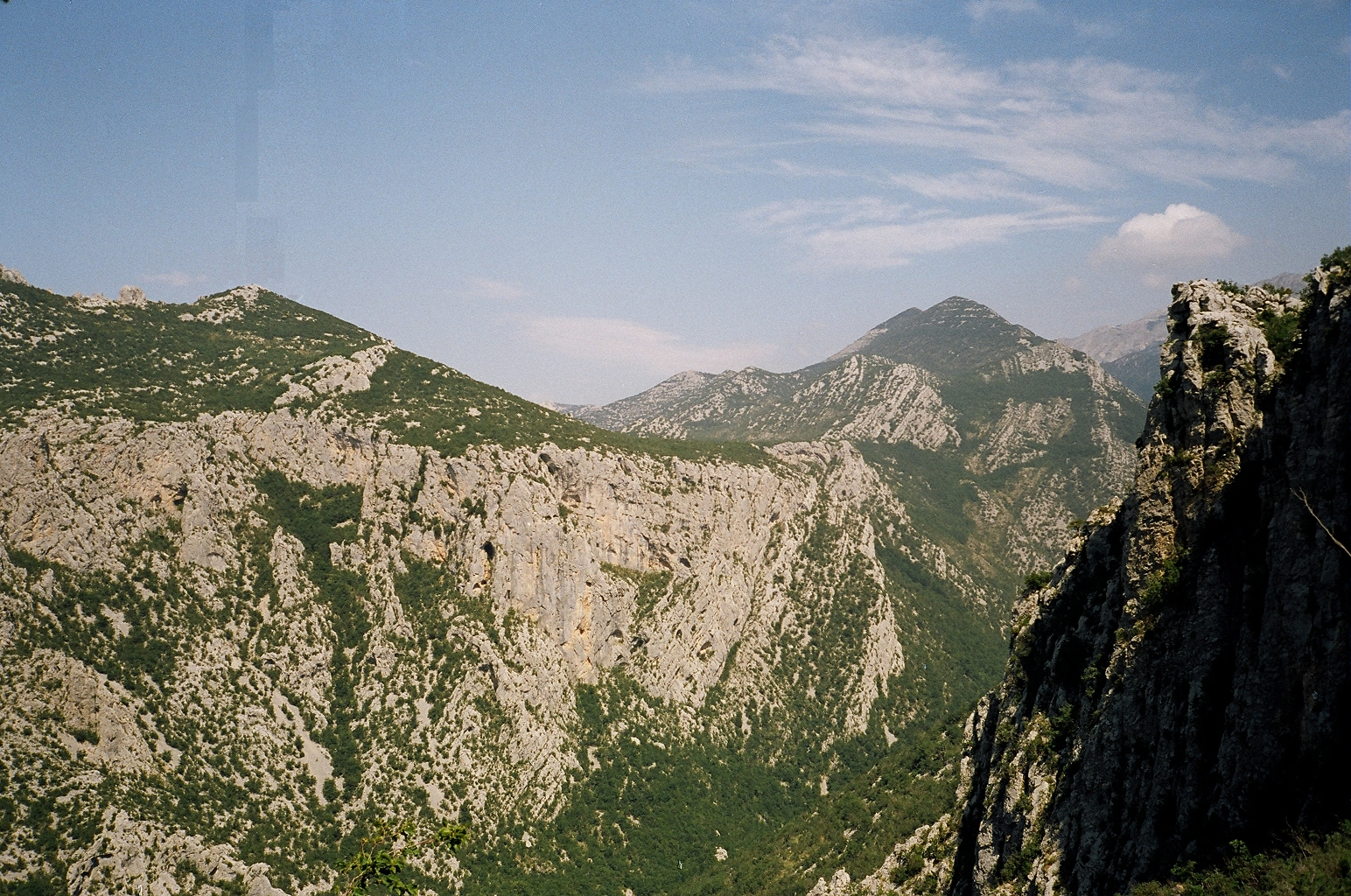 Paklenica national parky/Paklenicos nacionalinis parkas. Velebit/Velebitas